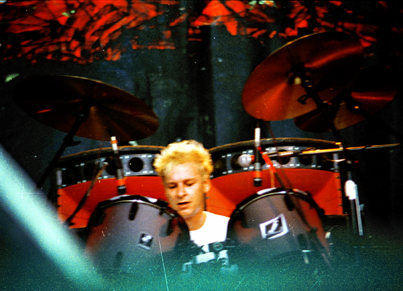 Wolfgang Rohde, Schlagzeuger der Toten Hosen, bei einem Konzert 1987 in Garching bei München.